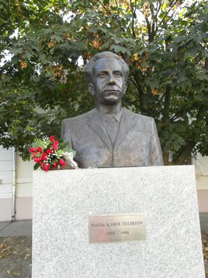 Паметник на проф. Карол Телбизов в Стар Бешенов, Румъния